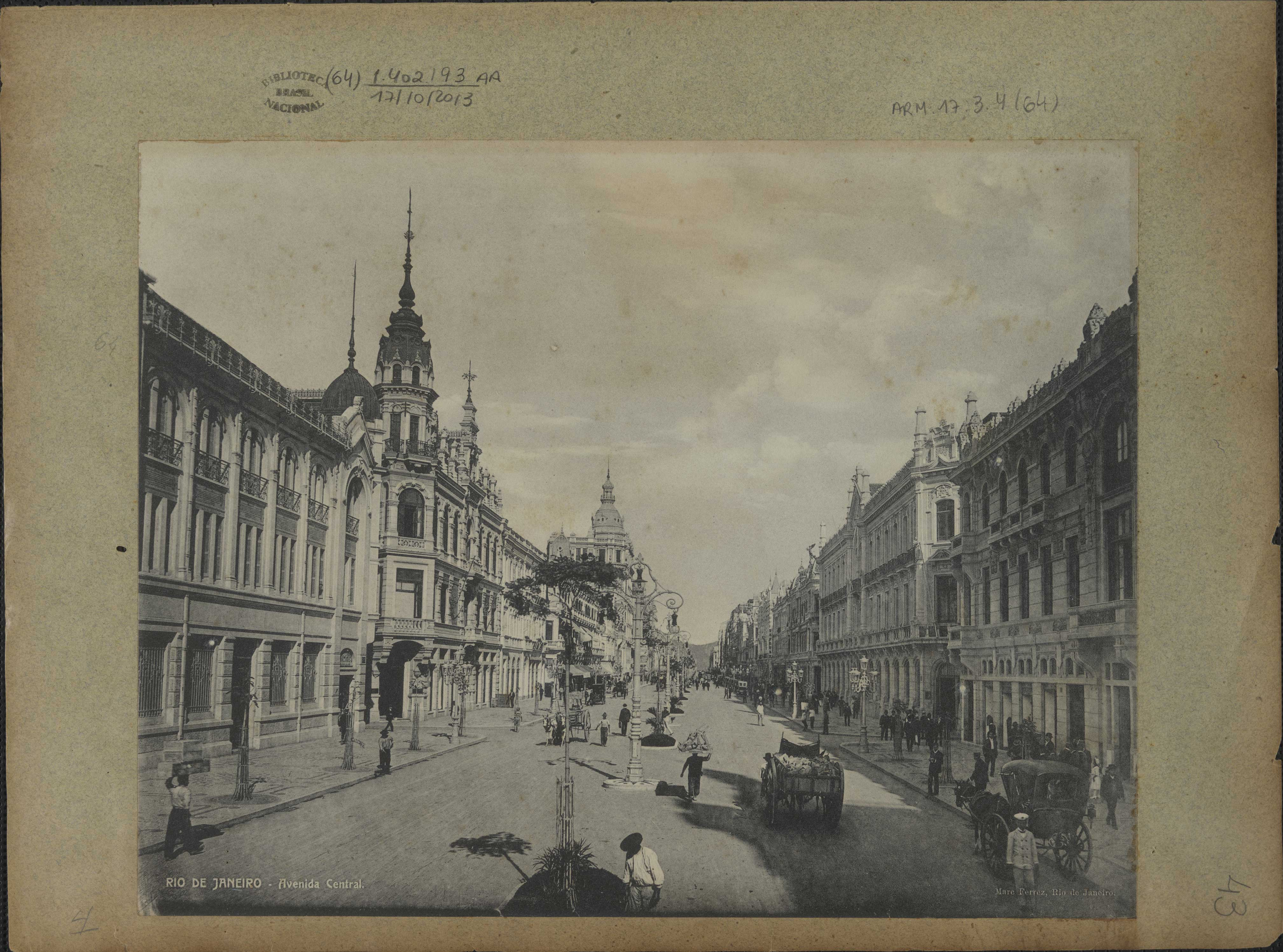 Rio de Janeiro [Iconográfico] : Avenida Central Imprenta Rio de Janeiro, RJ : [s.n.], ca.1908